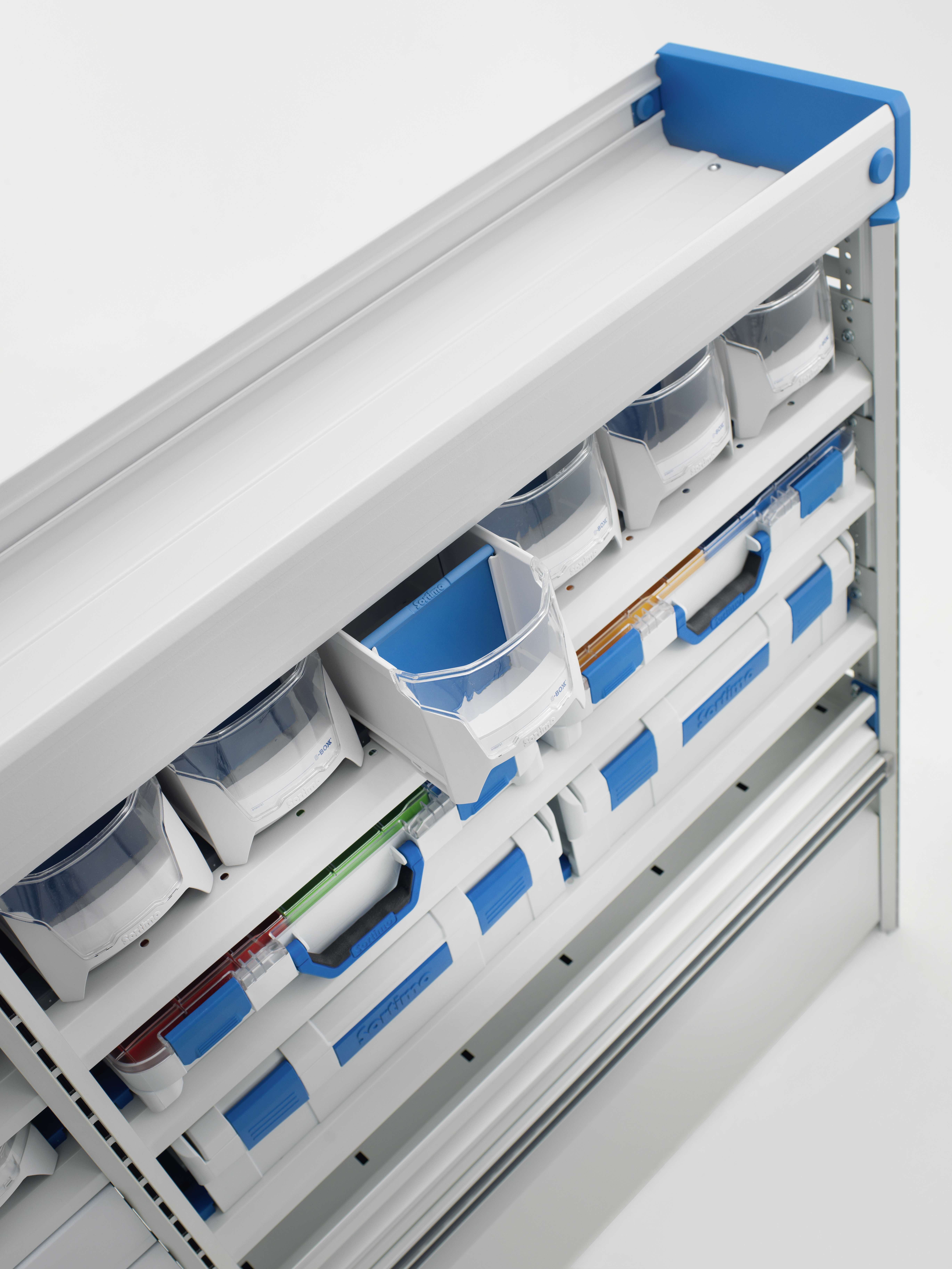 Mit Boxen, Koffern und Schubladen lässt sich der mobile Arbeitstag einfach organisieren.